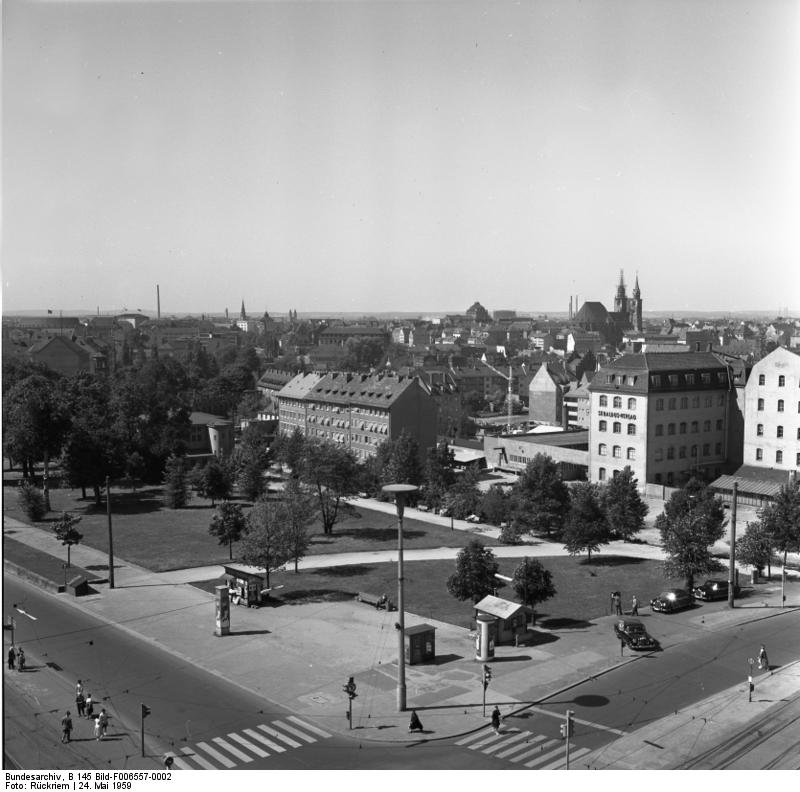 24.5.1959 Nürnberg Stadtüberblick Information added by Wikimedia users.